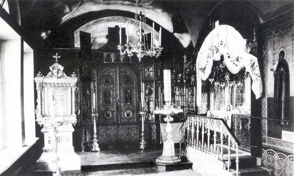 Северный придел в храме Святых Отцов Семи Вселенских Соборов во имя святого князя Даниила. Фото начала ХХ века